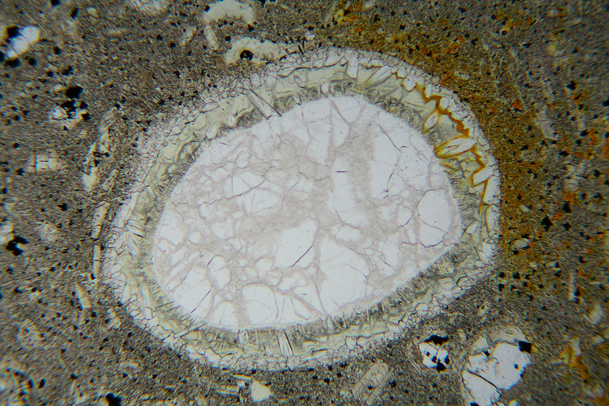 Unvollständige Assimilation und Reaktion eines quarzitischen Nebengesteins mit einem basaltischen Magma: Das (rundgeschmolzene) Quarzitrelikt ist von einer Schicht aus erstarrtem Glas umgeben, an deren Grenzfläche zum Basalt sich infolge Reaktion neue, größere KRistalle (Augit) gebildet haben. Dünnschliff, LPL.